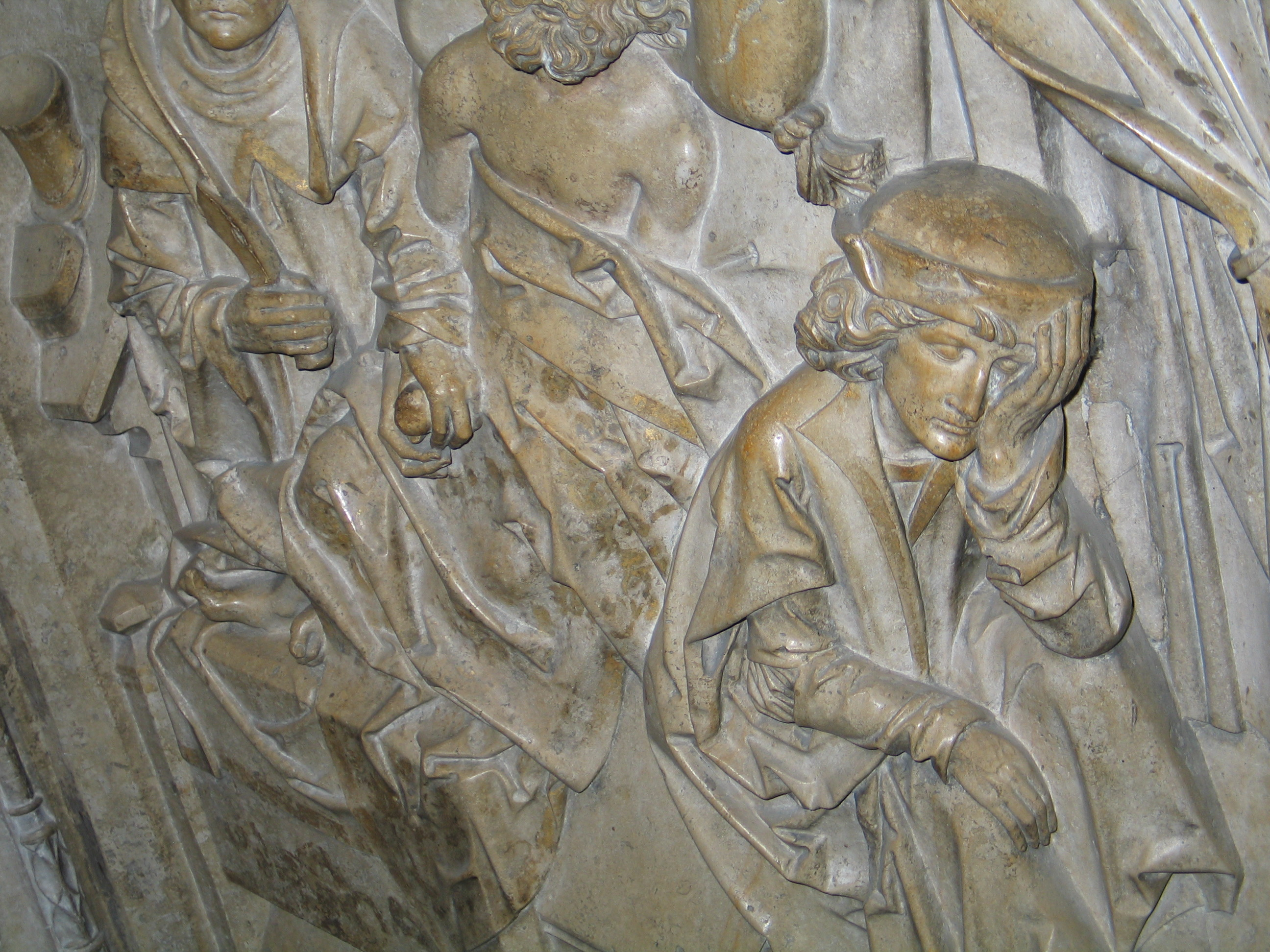 Die Heilung vom Steinleiden: Ausschnitt Kaisergrab Riemenschneider